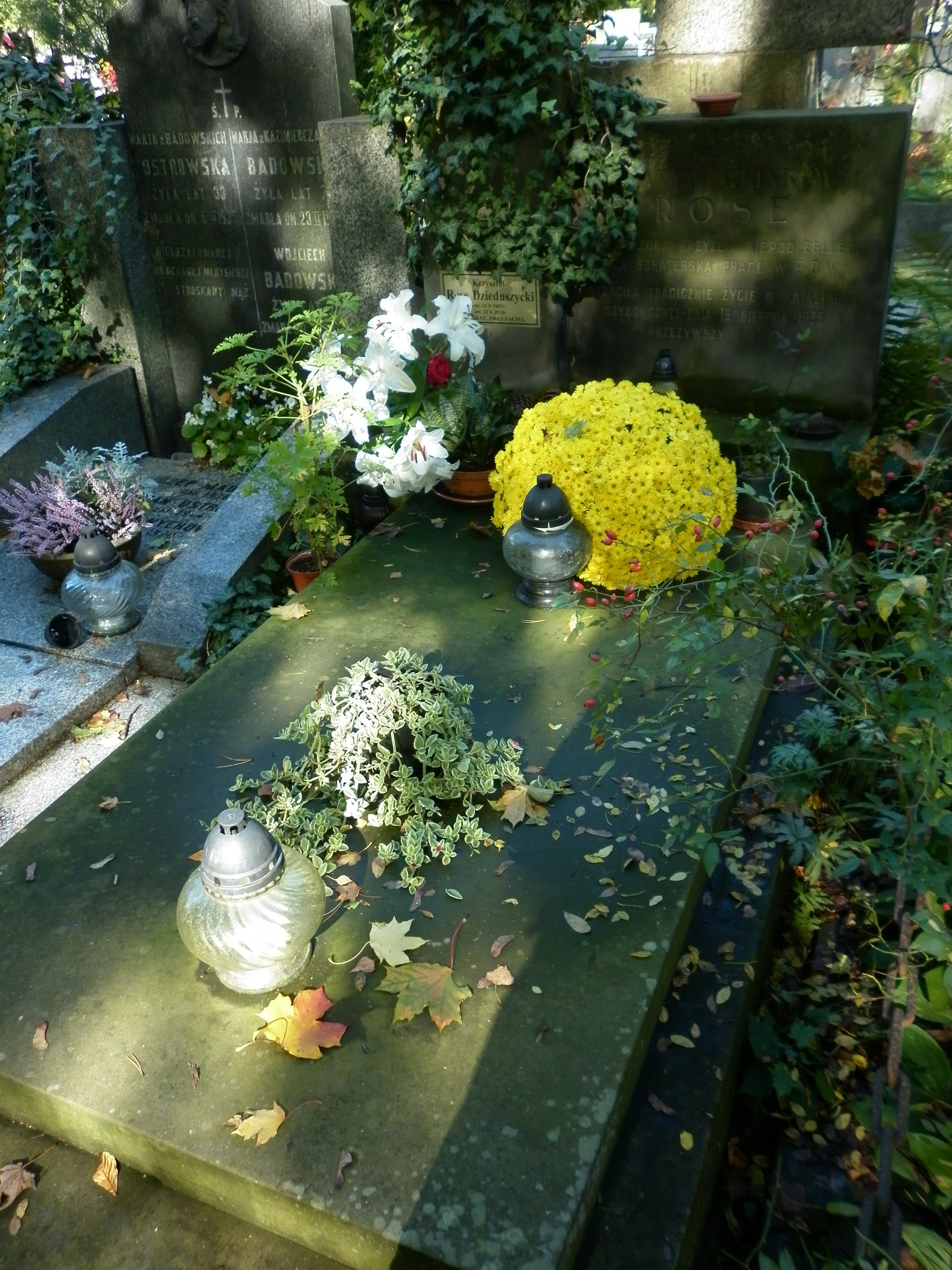 Grób Marii Rose na Cmentarzu Wojskowym na Powązkach